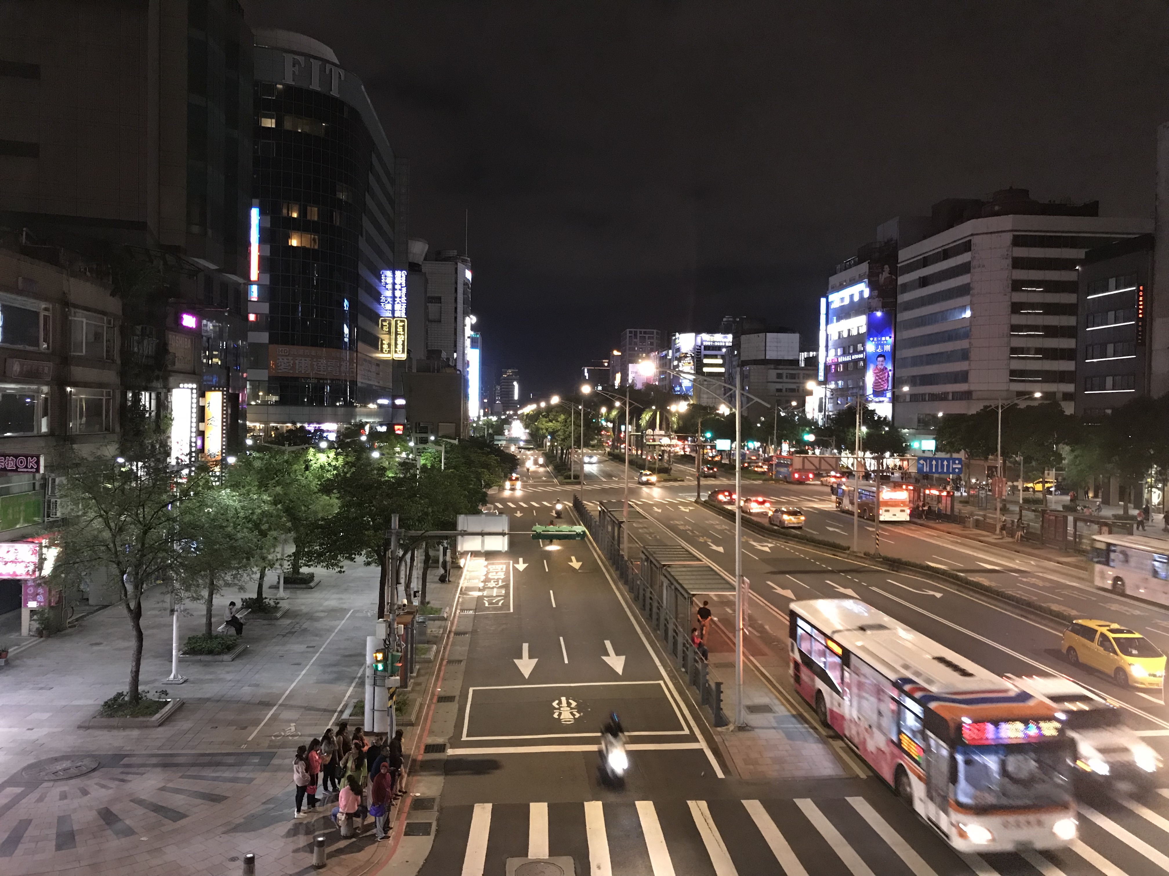 台湾台北市の中華路一段と開封街一段の交差点にて南方面を歩道橋より撮影。